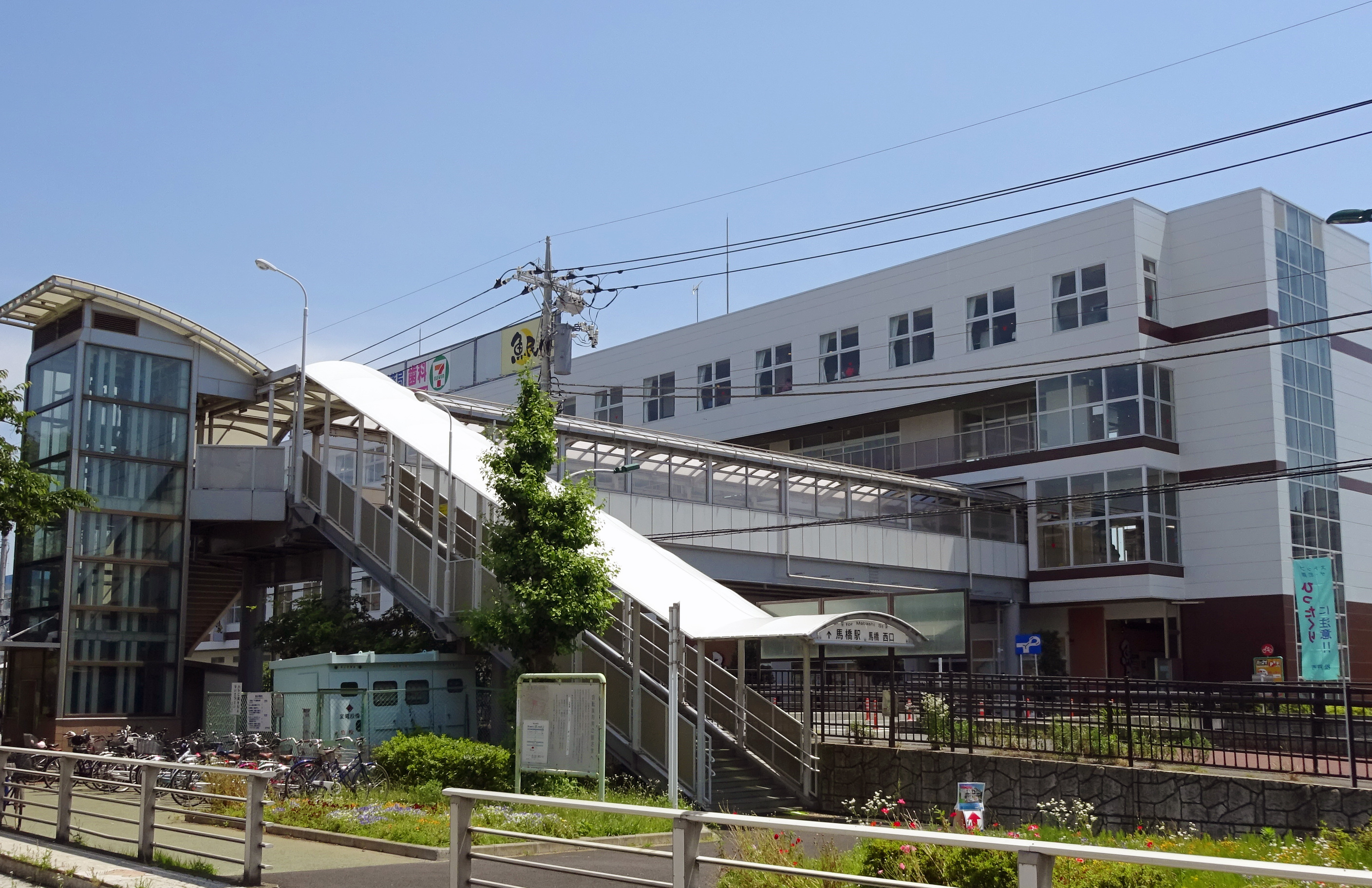 馬橋駅西口(cropped)